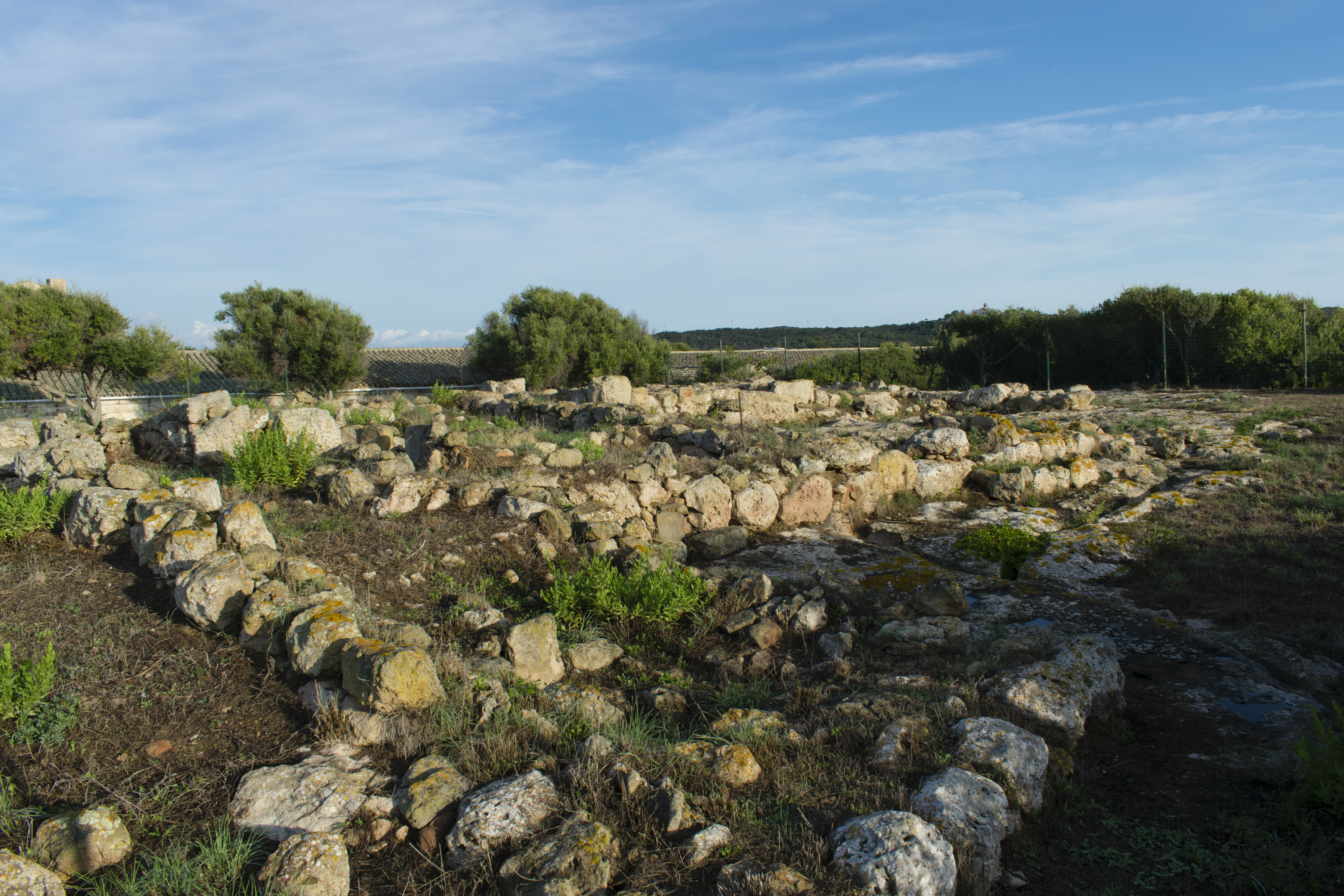 Basílica paleocristiana de l'illa del Rei (S'illa del Rei)